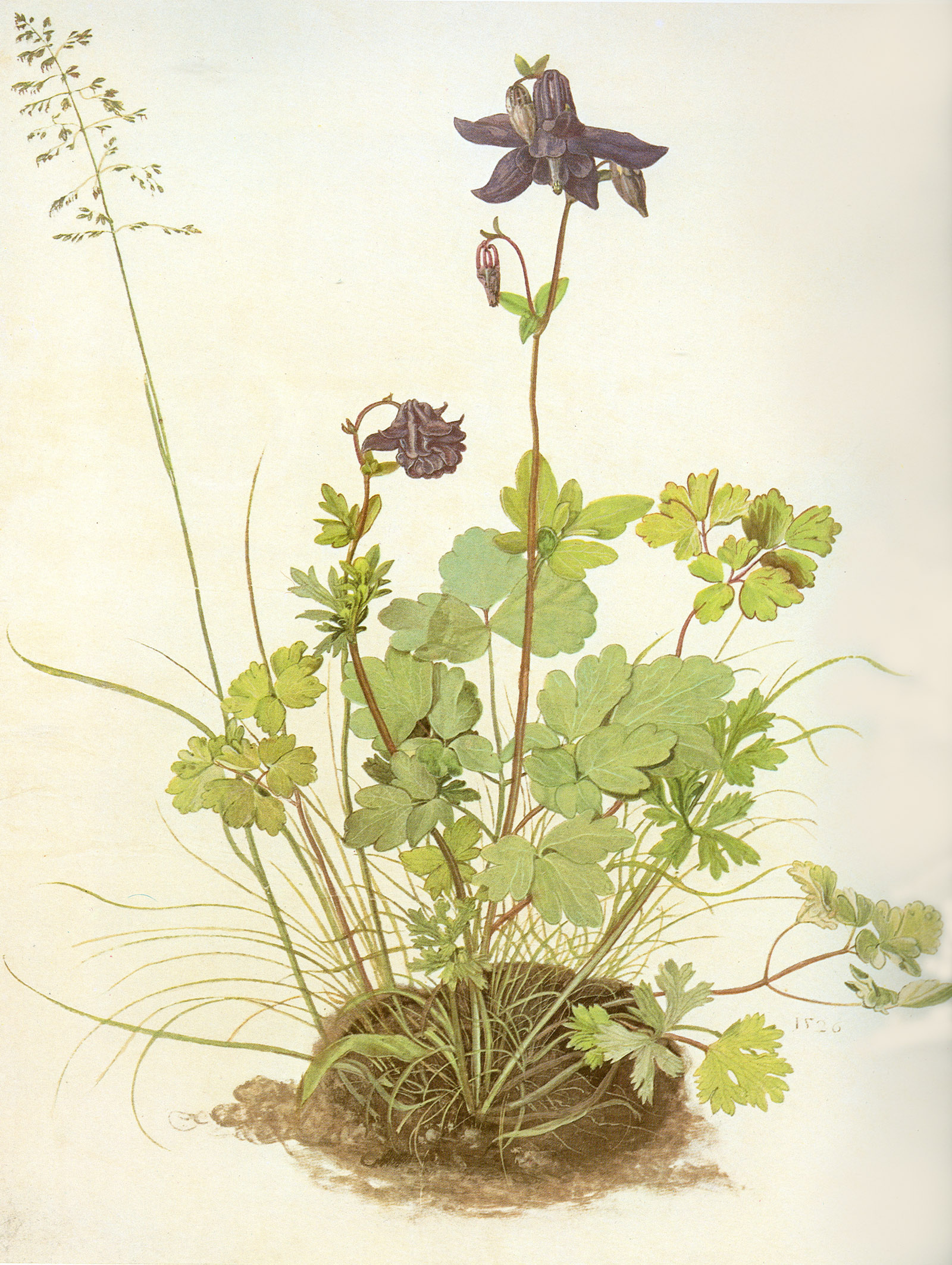 Alkelei-Blume (Aquilegia), columbine